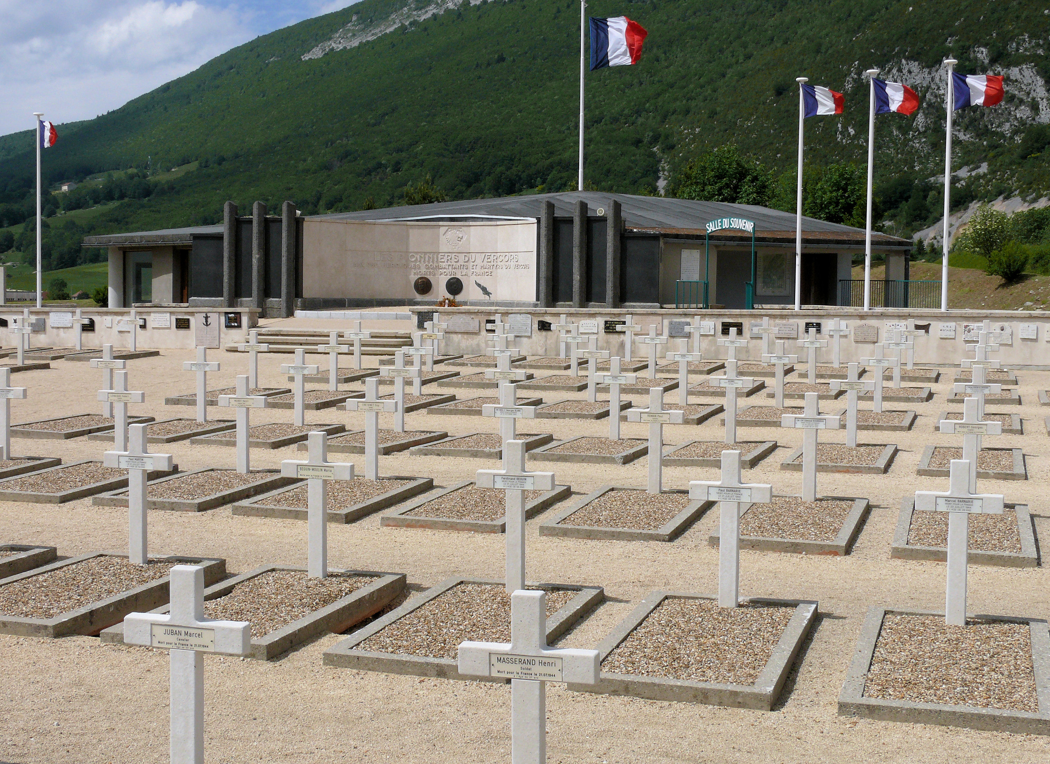 Vassieux-en-Vercors - Nécropole